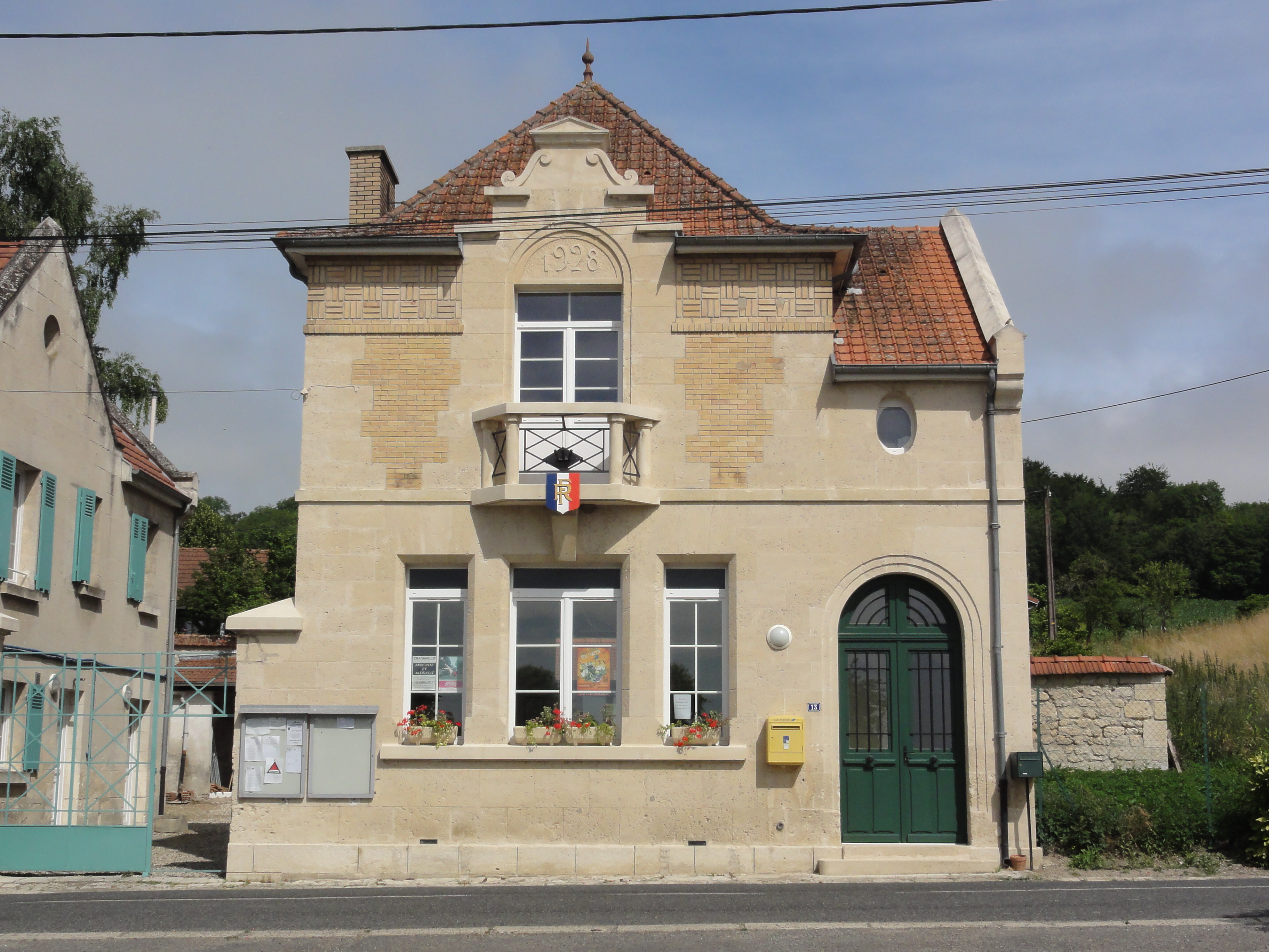 Vassogne (Aisne) mairie